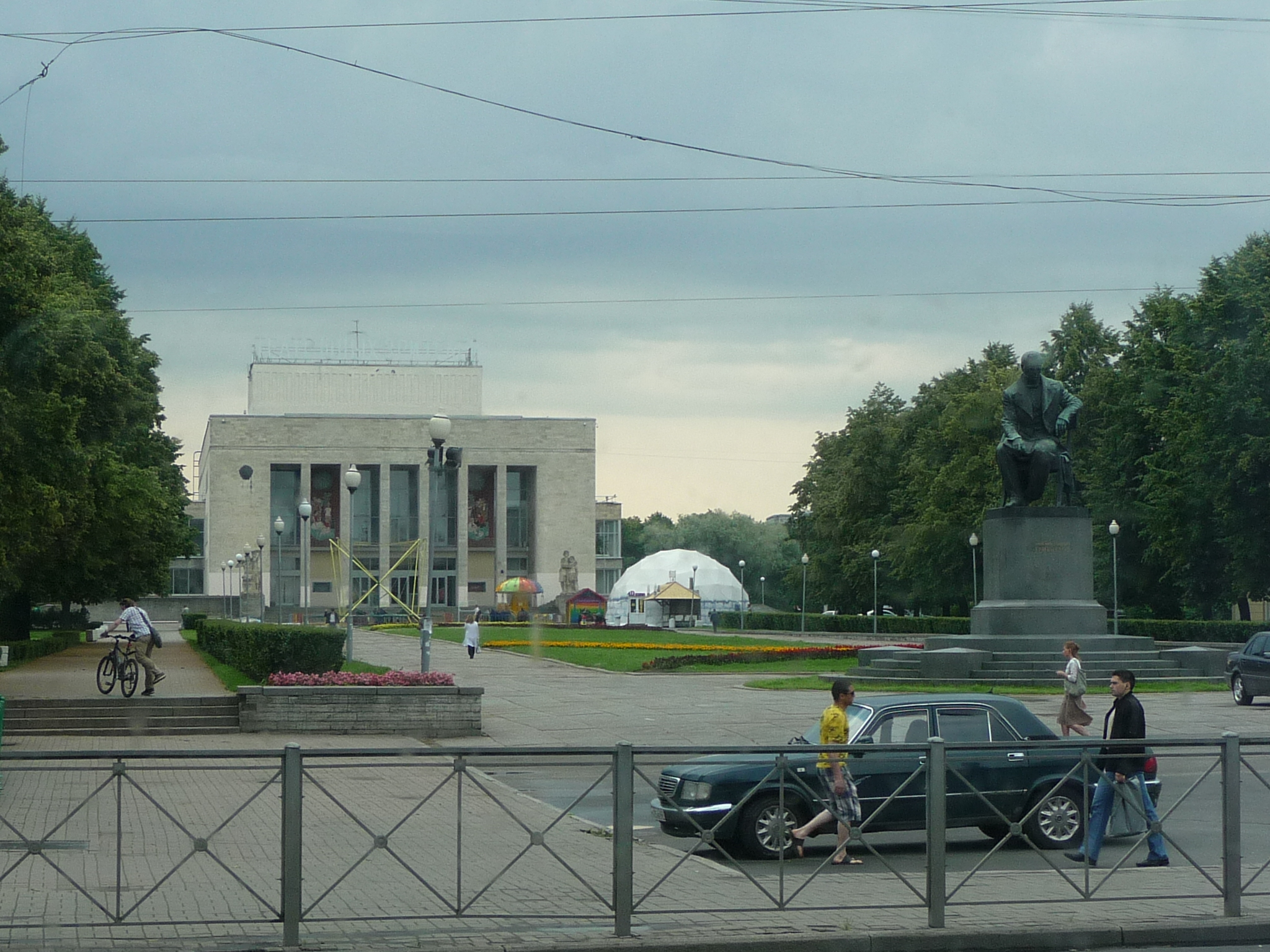 Monument-p1030435.jpg